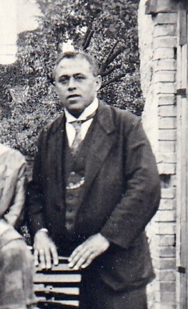 Emil Otto Sommer (1885-1936), rechtskundiger Bürgermeister von Treuchtlingen